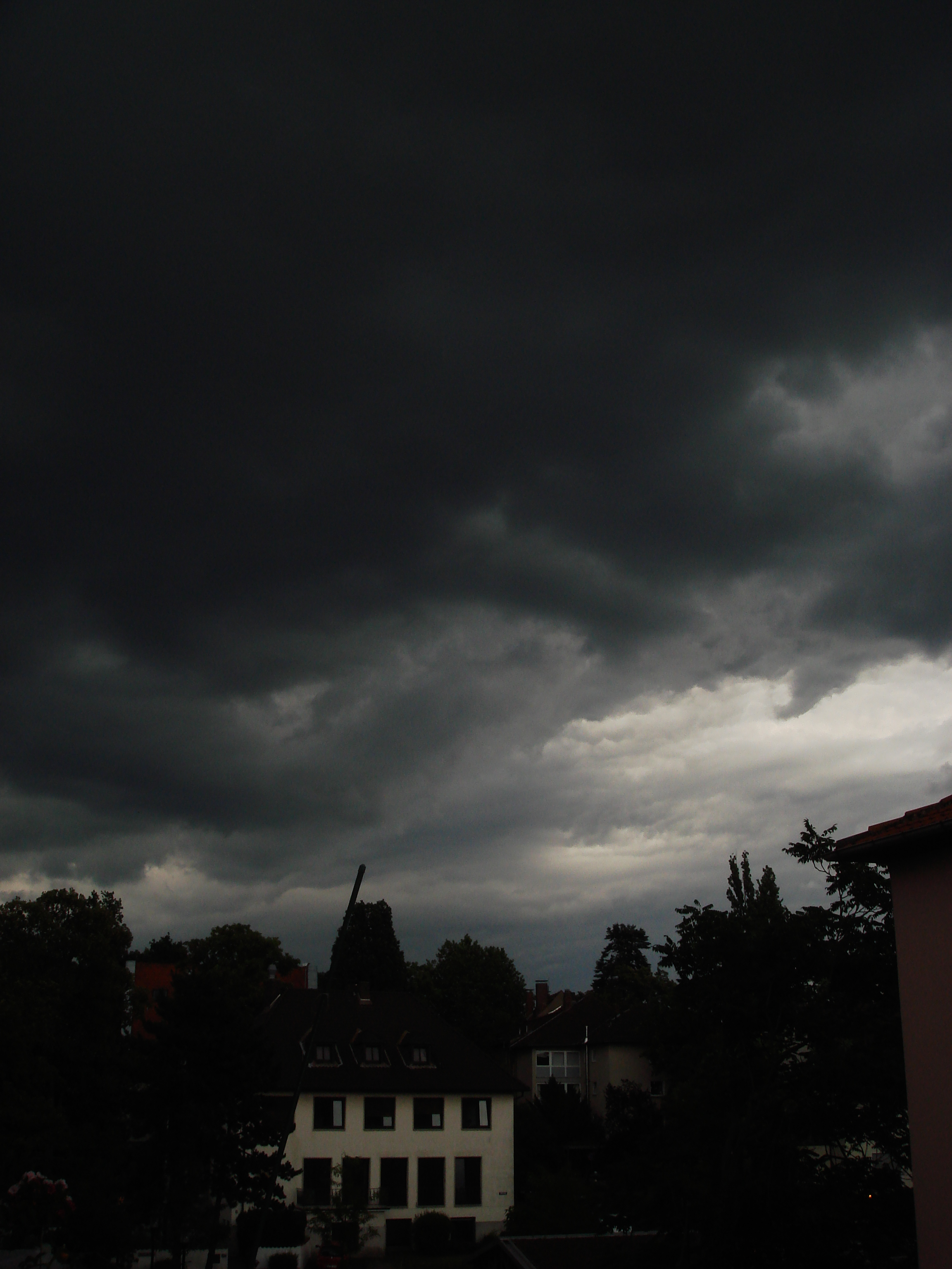 Gewitterwolken in Südhessen